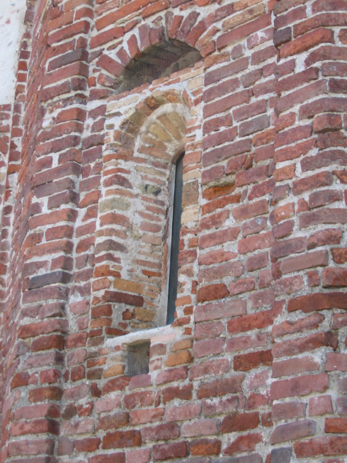 Basilica Autarena di Fara Gera d'Adda, nel comune di Fara Gera d'Adda.